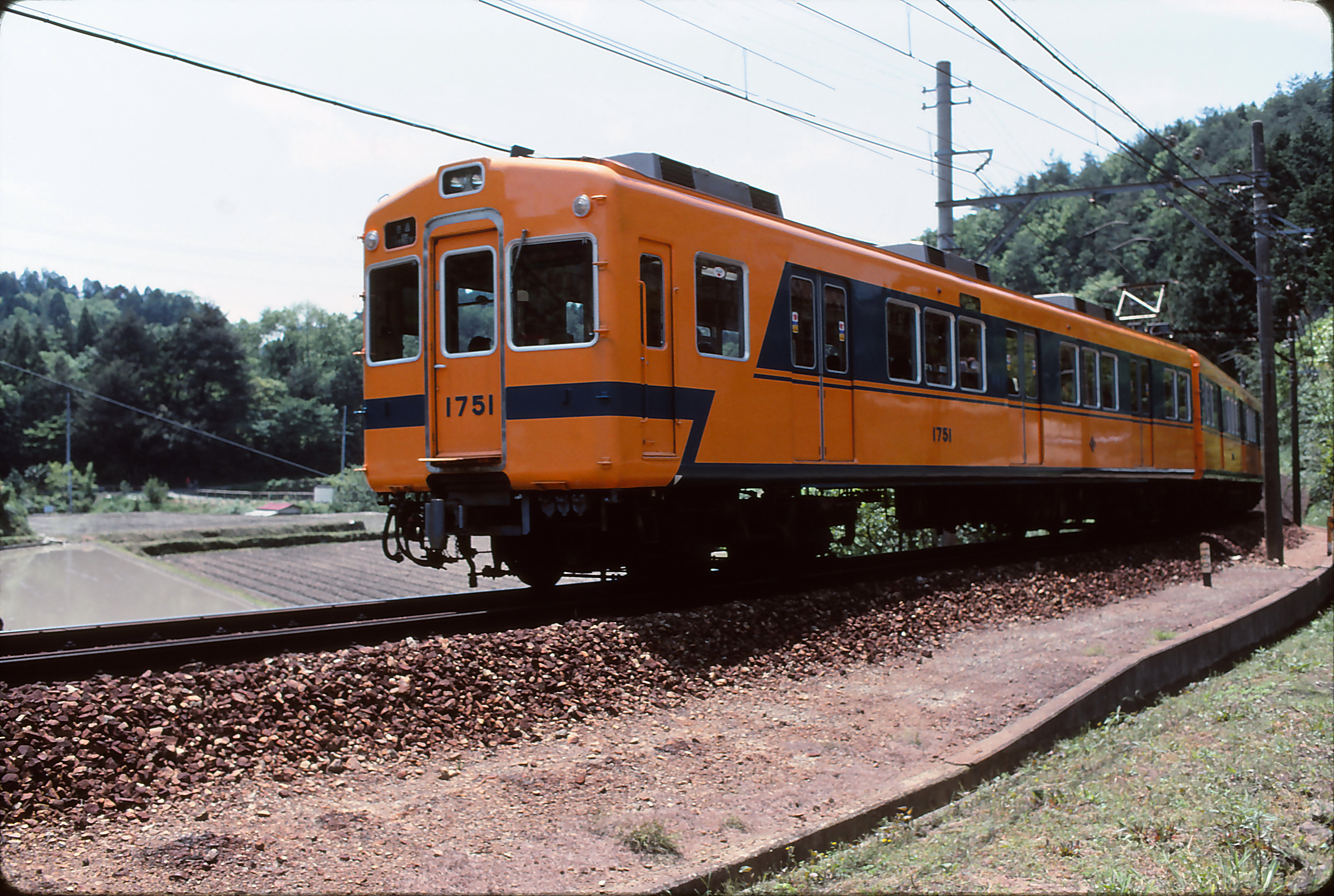 能勢電鉄妙見線 妙見口駅-ときわ台駅